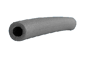 Izolačná pena mirelon